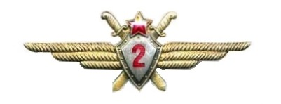 Нагрудный знак классной квалификации "Военный лётчик 2-го класса" образца 1950 года